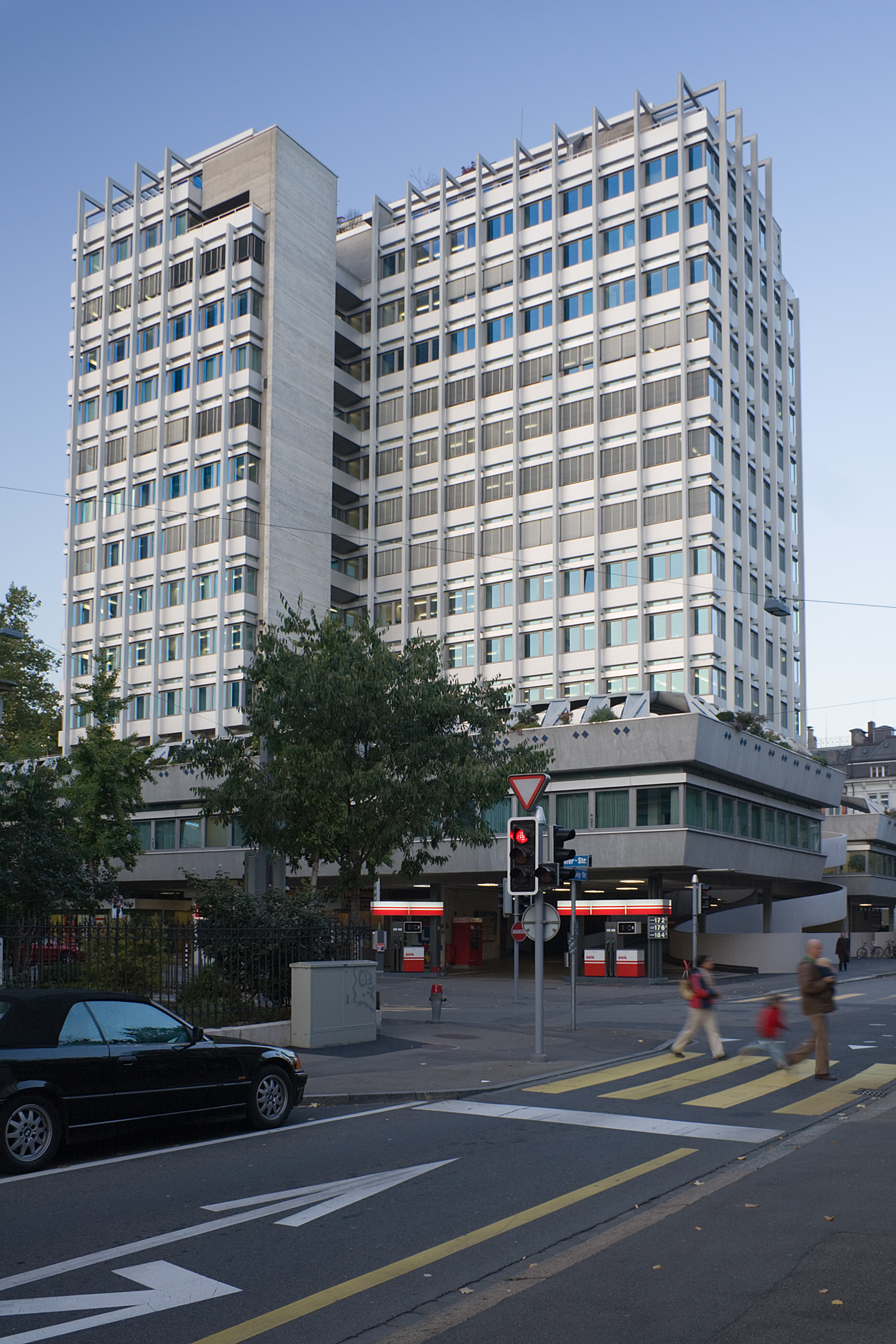 Hochhaus zur Palme, Bleicherweg 33, Zürich, Schweiz